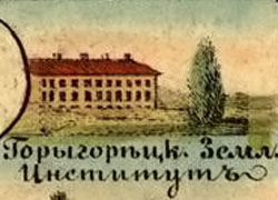 Беларуская (тарашкевіца): Горкі (Horki). Земляробчы інстытут, пазьней сельскагаспадарчая акадэмія